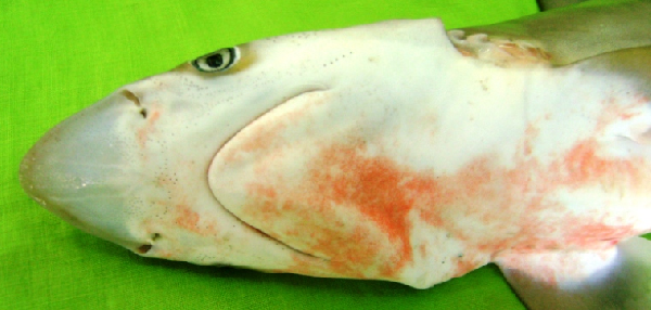 серая длиннорылая акула